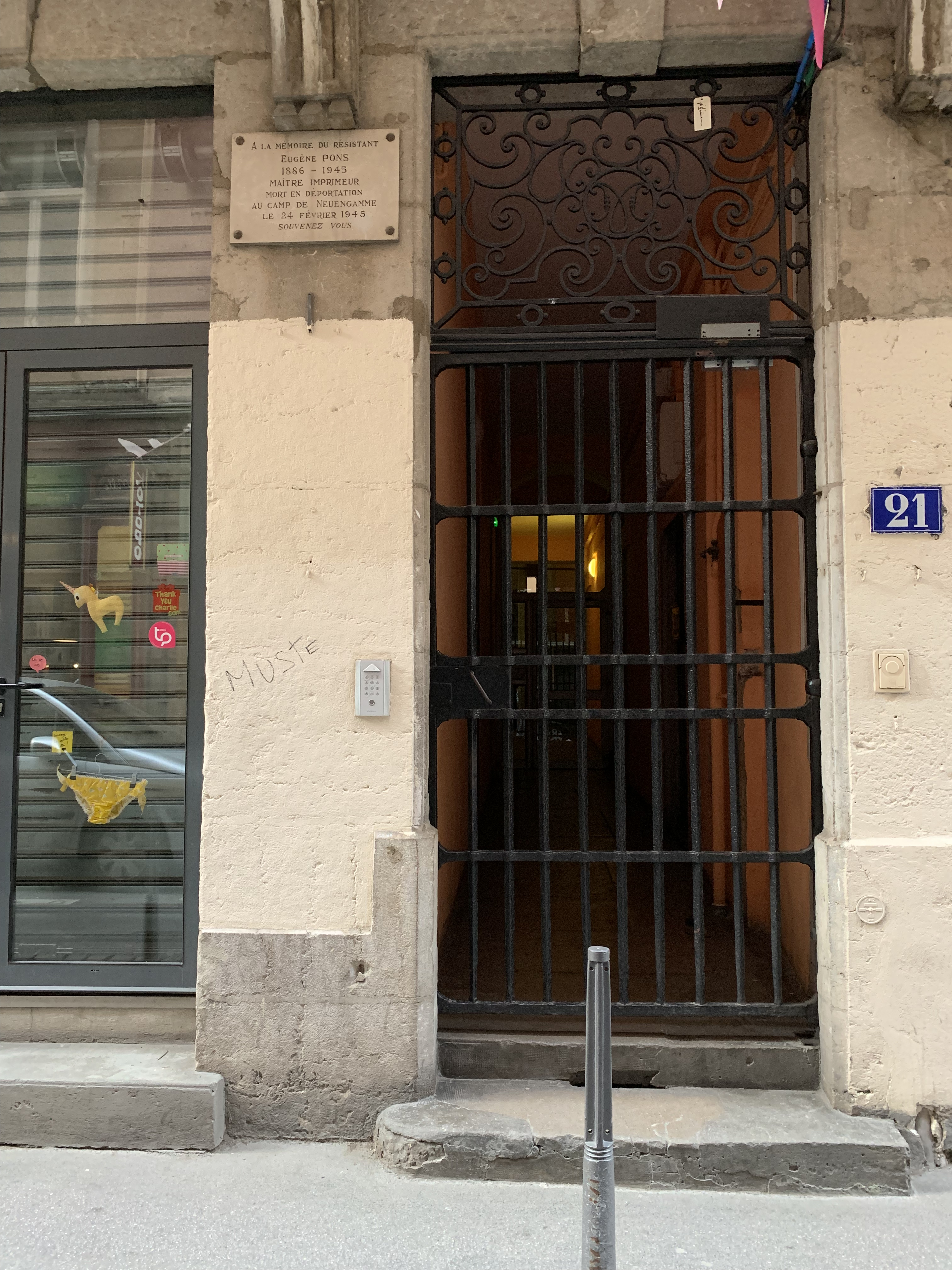 Le 21 Rue René Leynaud et la plaque à Eugène Pons.